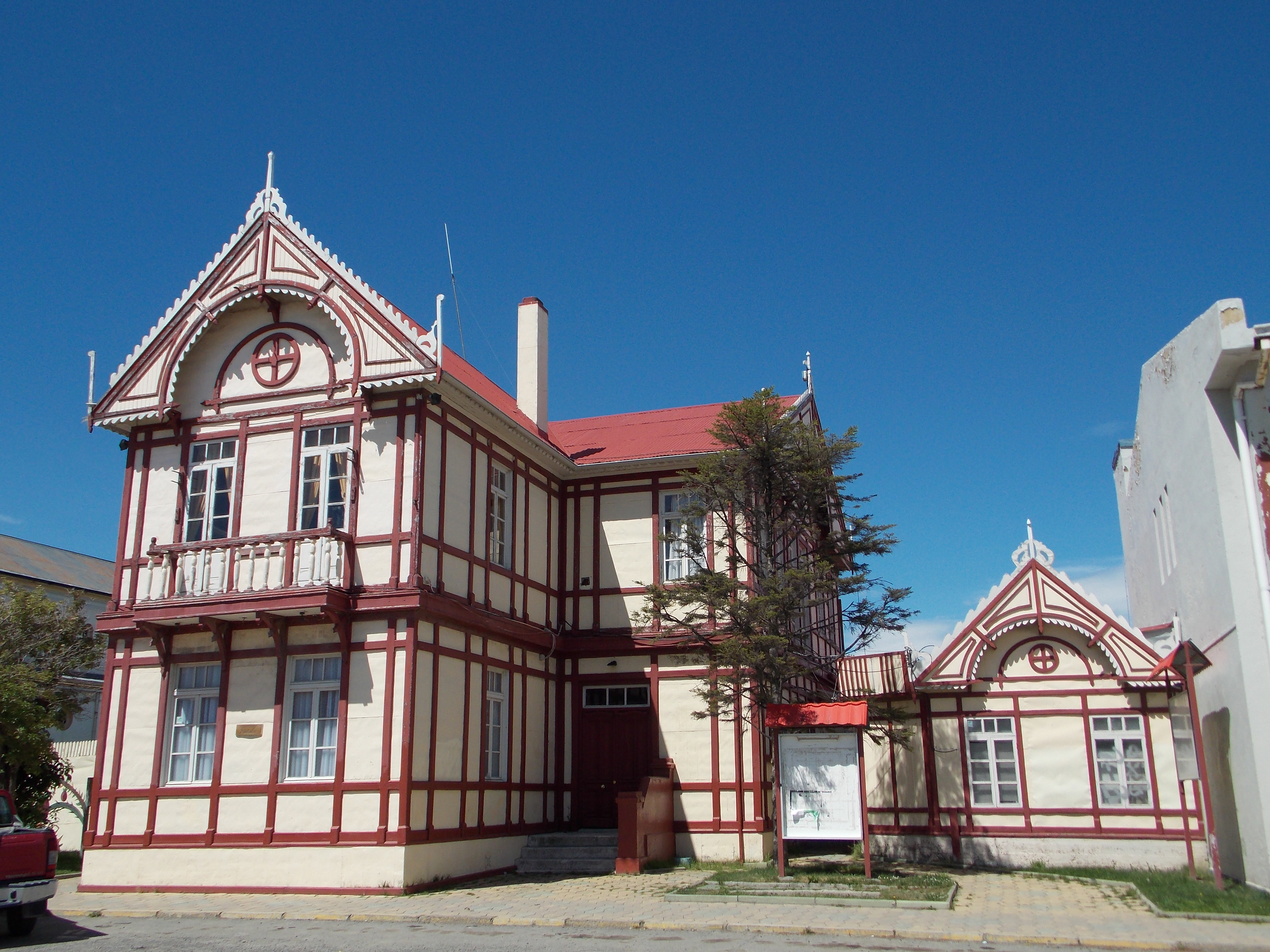 Edificio Municipal de Puerto Natales, XII Región de Magallanes